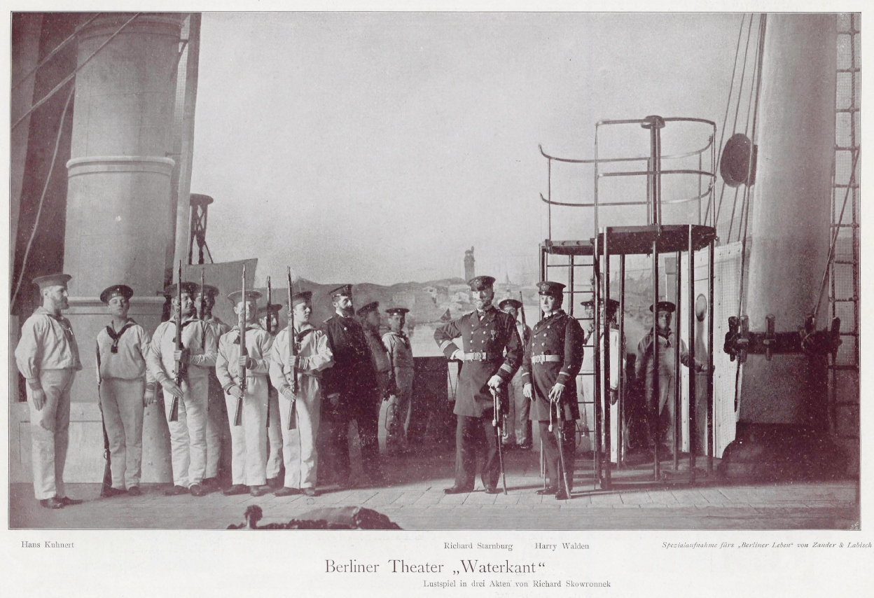 Szene aus dem Lustspiel "Waterkant" von Richard Skowronnek aus einer Aufführung des Berliner Theaters (Frühjahr 1904).